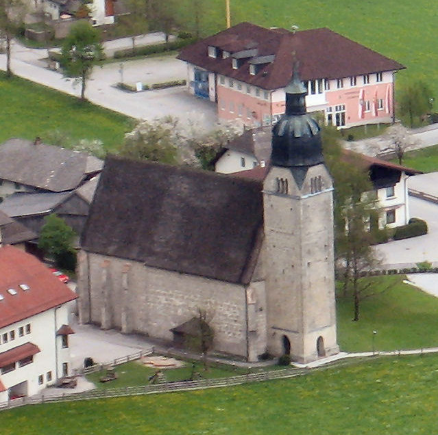 Kath. Filialkirche hl. Ulrich